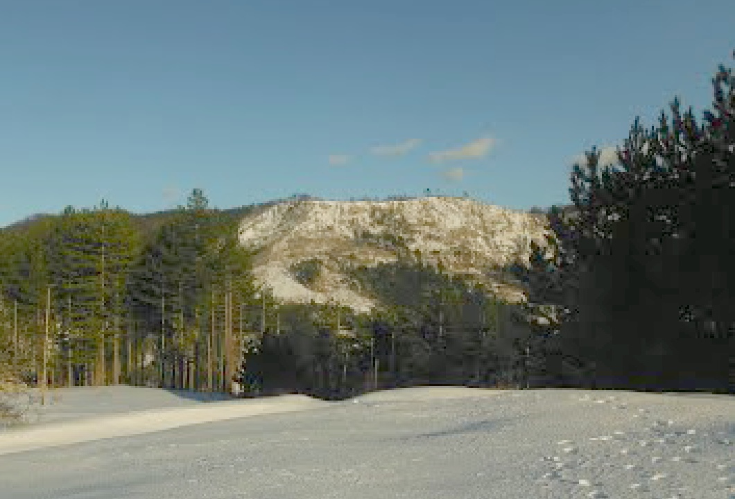 Gornje Dubovo, selo kod Višegrada - zima u selu.